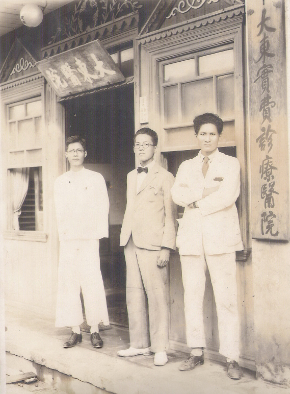 莊孟侯 (最左)，攝影於他開設的大東醫院(後臺南市西門圓環普濟殿附近)。